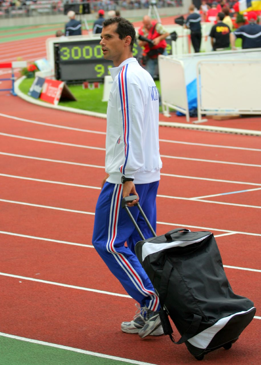 Romain Mesnil au Décanation 2006